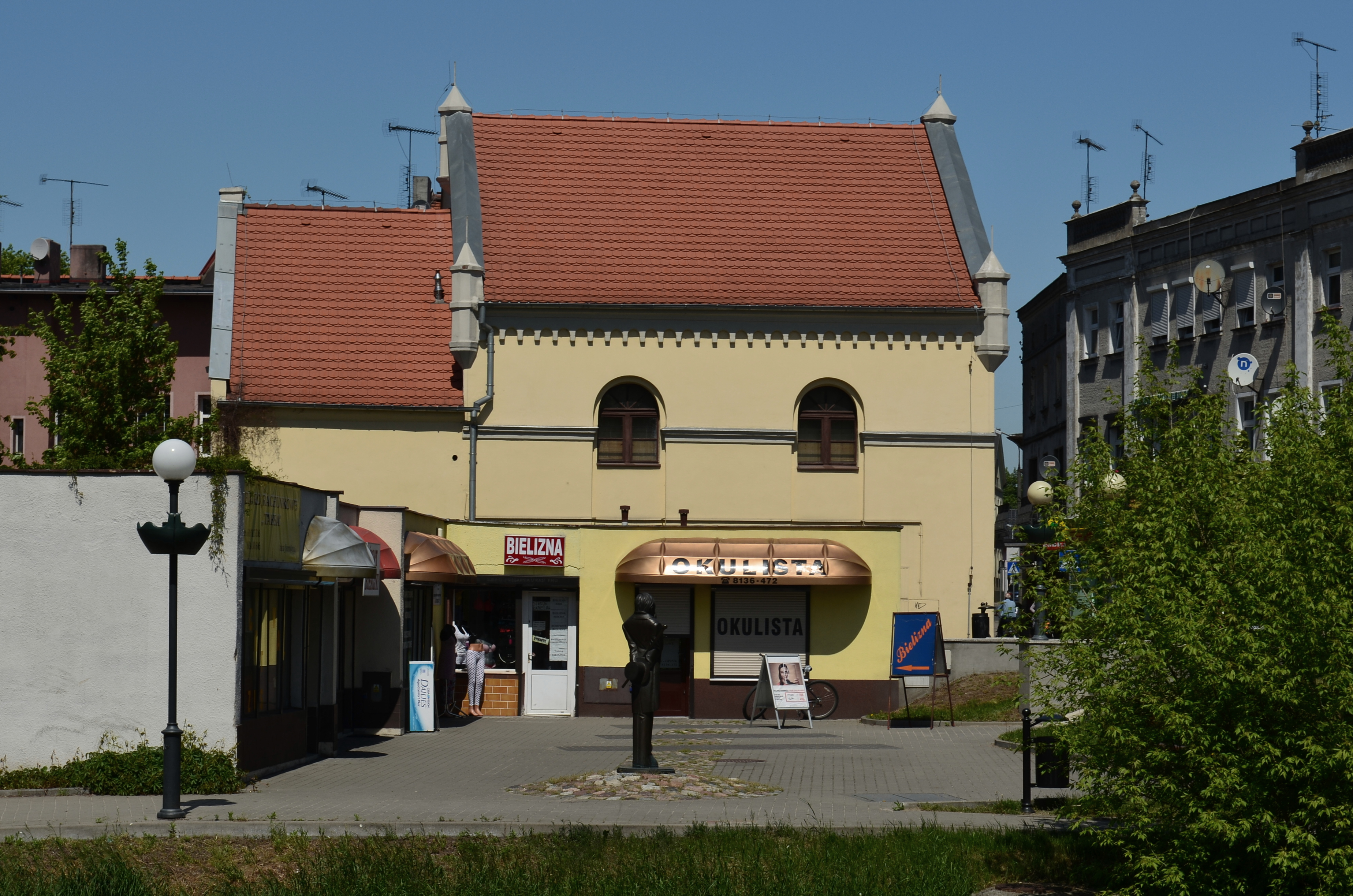 Mosina, synagoga, ob. izba muzealna, pocz. XX